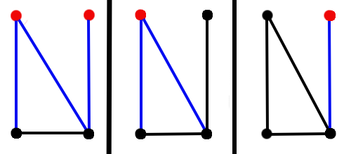 Beispiel für einen minimalen Schnitt in einem Graphen